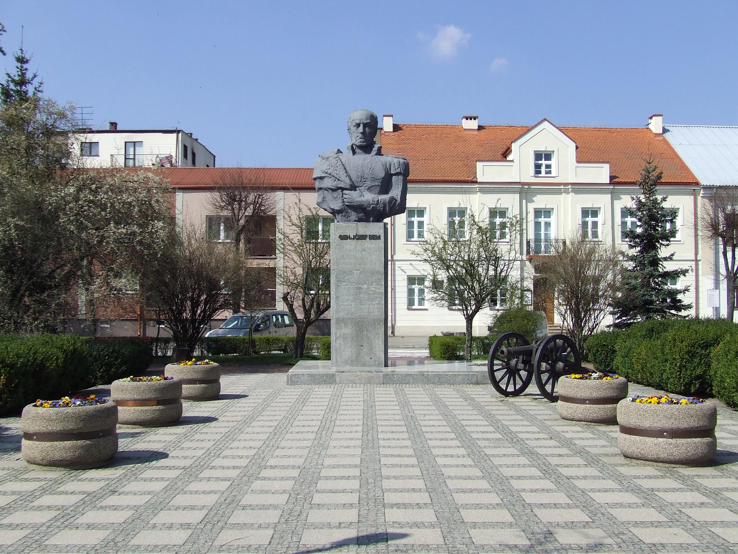 Pomnik gen. Józefa Bema w Ostrołęce